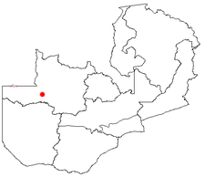 Lage von Kabompo in Sambia